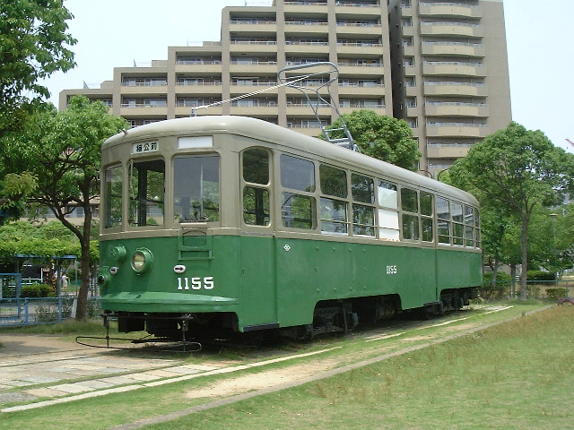 神戸市電1155